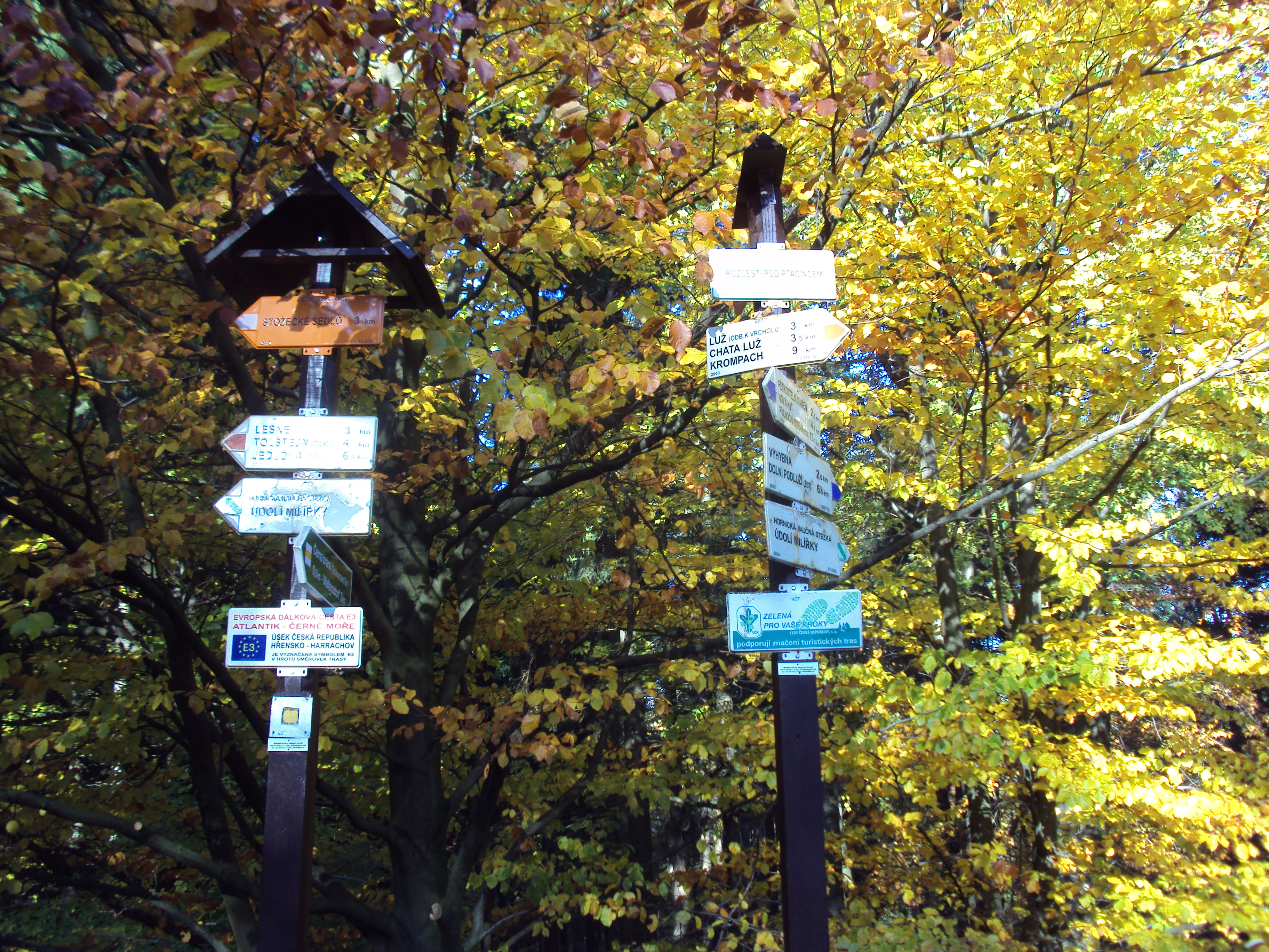 Rozcestník je u hranic se Saskem v Lužických horách, katastr obce Dolní Podluží